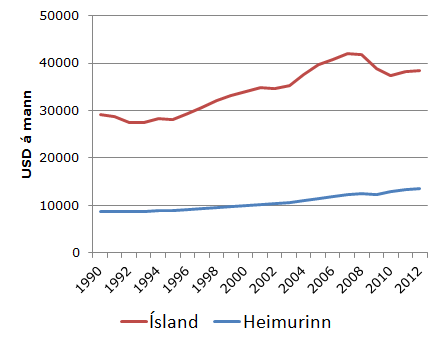 Verg landsframleiðsla á mann. Heimild: World Bank. (2014). GDP per capita, PPP (constant 2011 international $) [tafla]. Sótt af